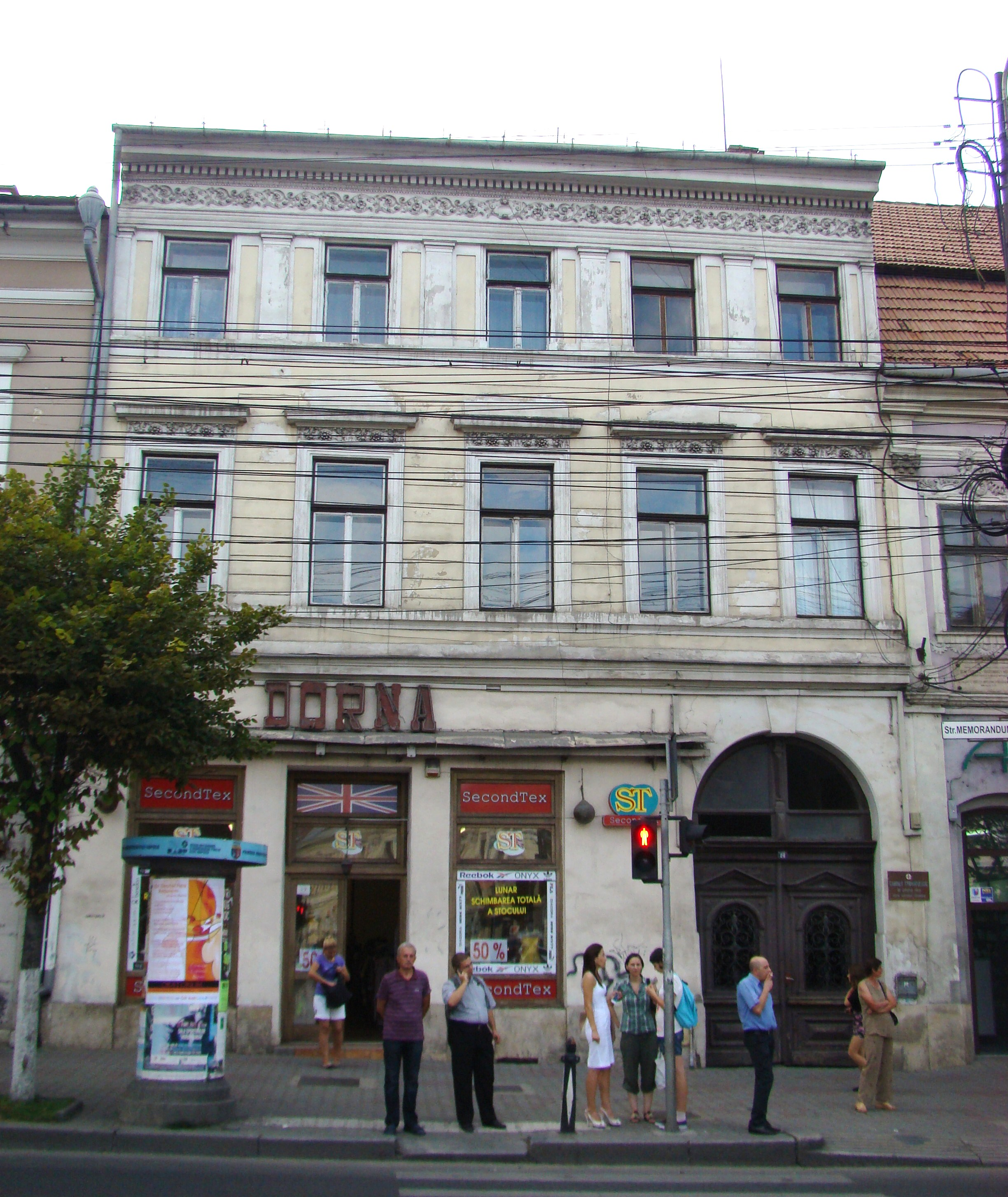 Casă monument istoric, Piața Unirii 26